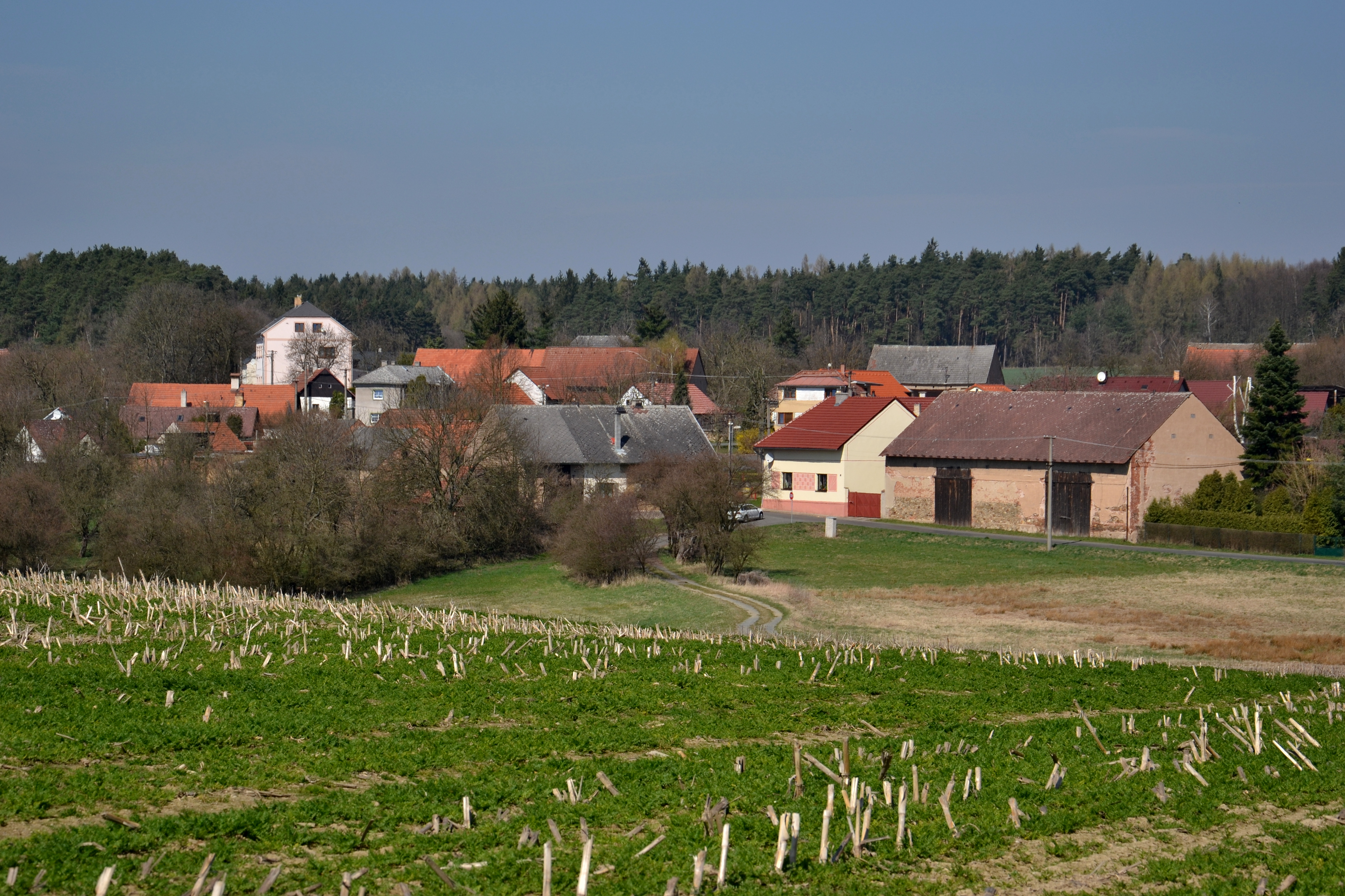 Bělbožice – celkový pohled na vesnici od jihozápadu